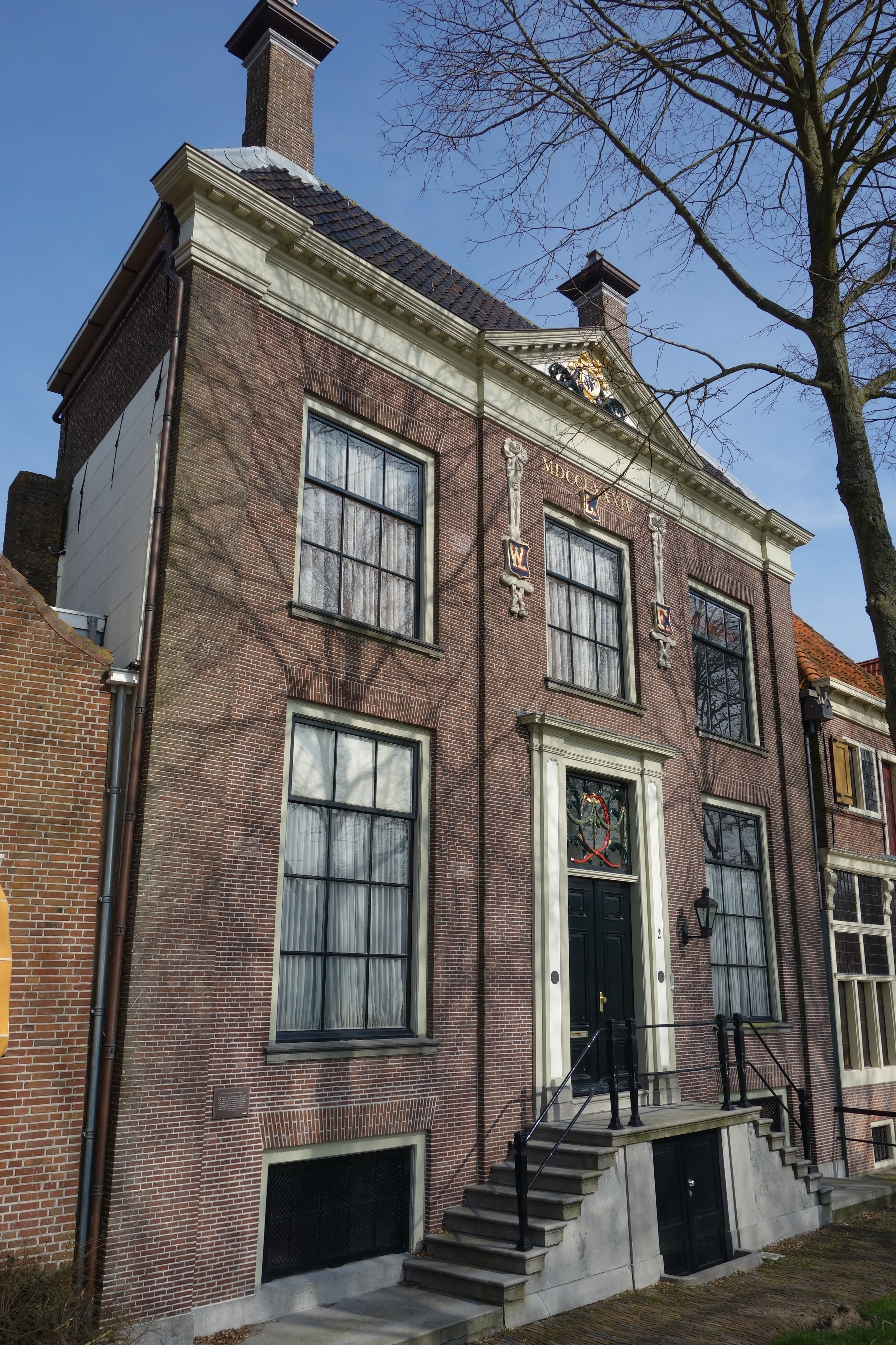 Voorgevel van Binnenluiendijk 2 in Hoorn. Pand is eigendom van de Vrijmetselaarsloge van West-Friesland.